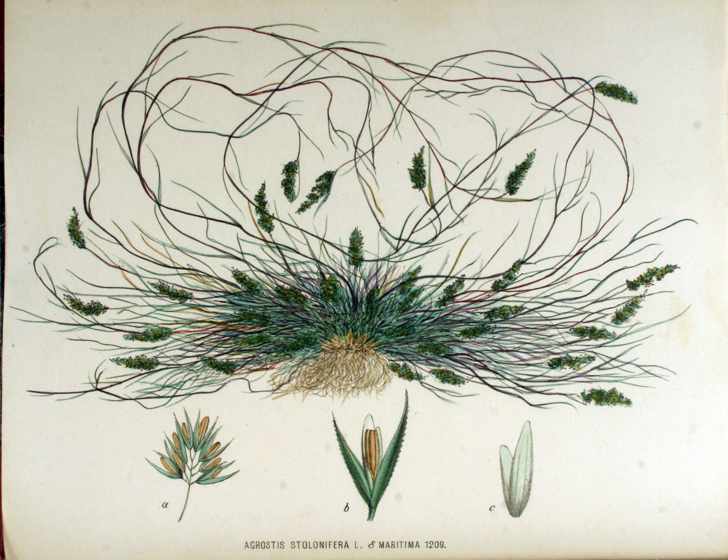 Agrostis stolonifera L. (Syn. Agrostis alba auct. non L.)